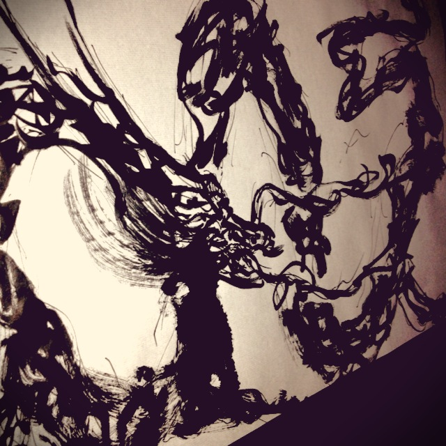 水墨画の龍